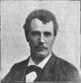 portret Jana Kasprowicza z książki "Upominek. Książka zbiorowa na cześć Elizy Orzeszkowej (1866-1891)"